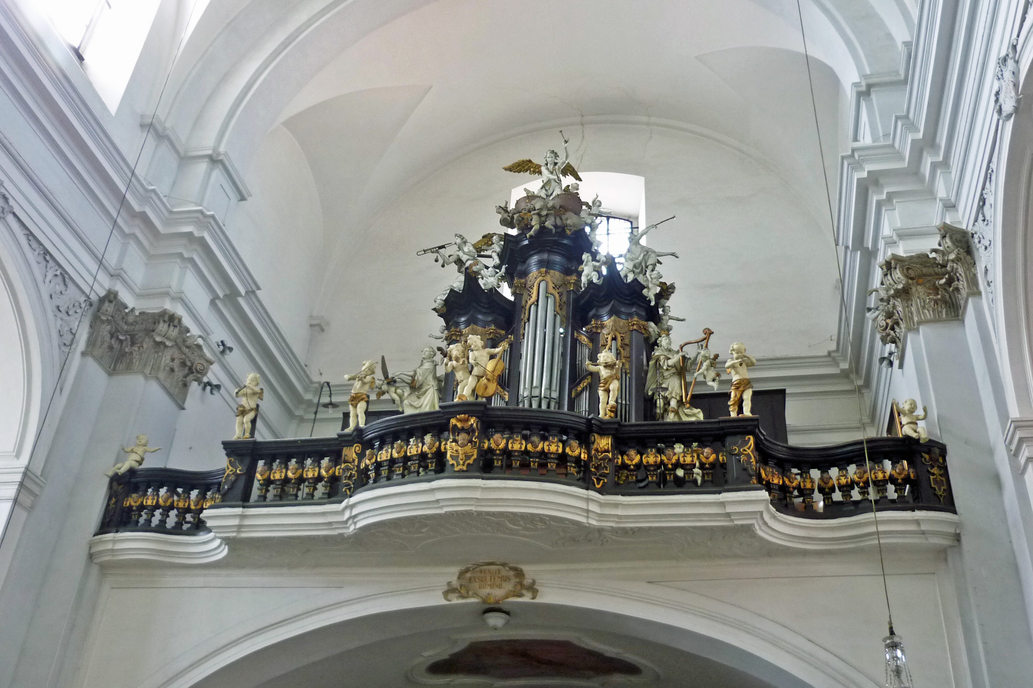 Orgelempore mit musizierenden Engeln in der Basilika in Mariaschein (Bohosudov)